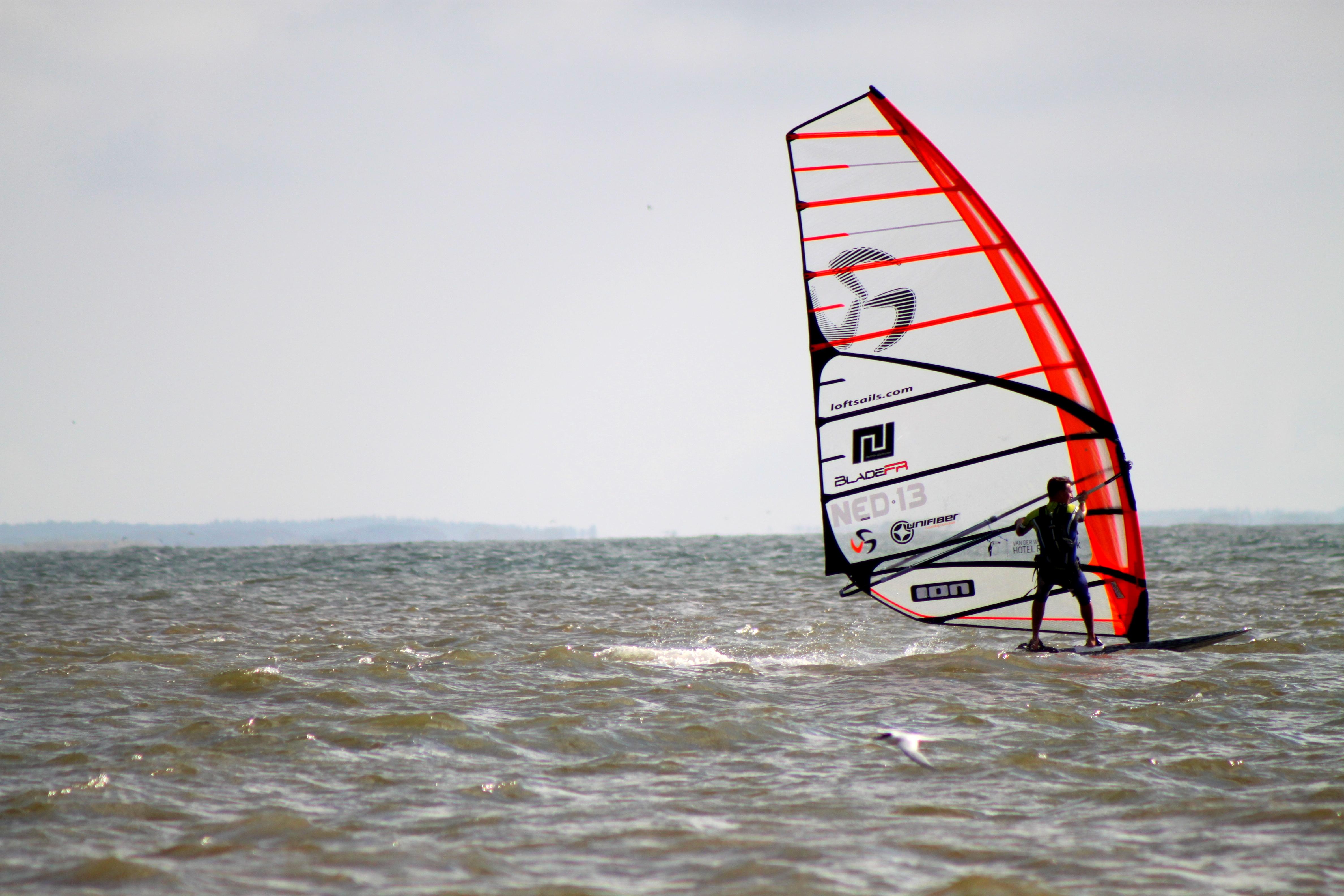 Ronde van Texel 2014 - De snelste windsurfer bij de Ronde van Texel 2014 - Dennis Littel - Hier rond Dennis Texel bij de vuurtoren